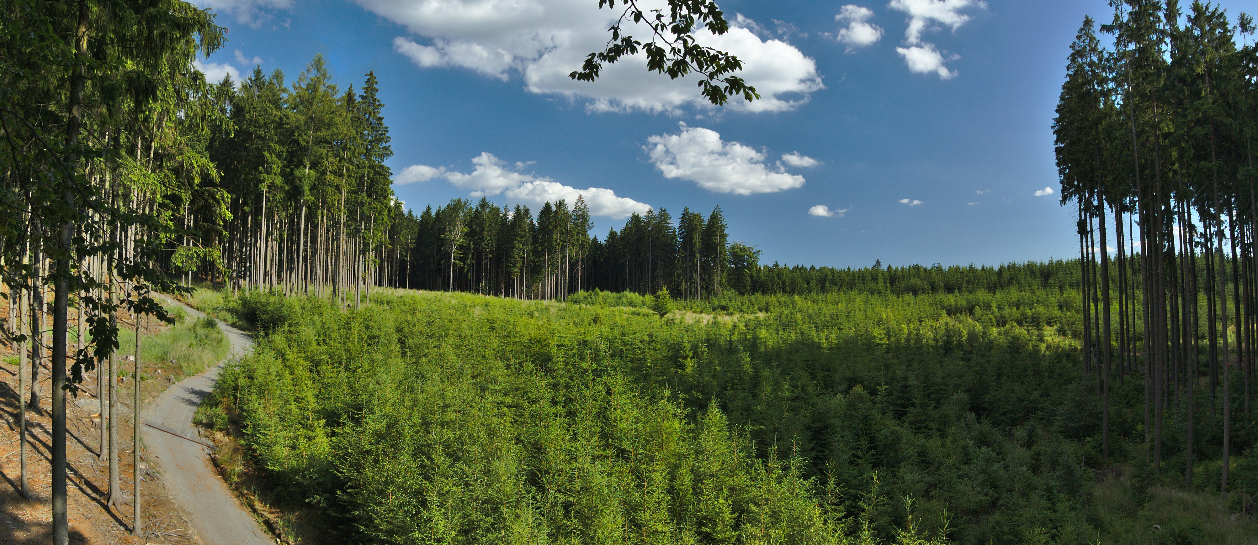 Pohled na smrkovou monokulturu z posedu, Protivanov, okres Prostějov